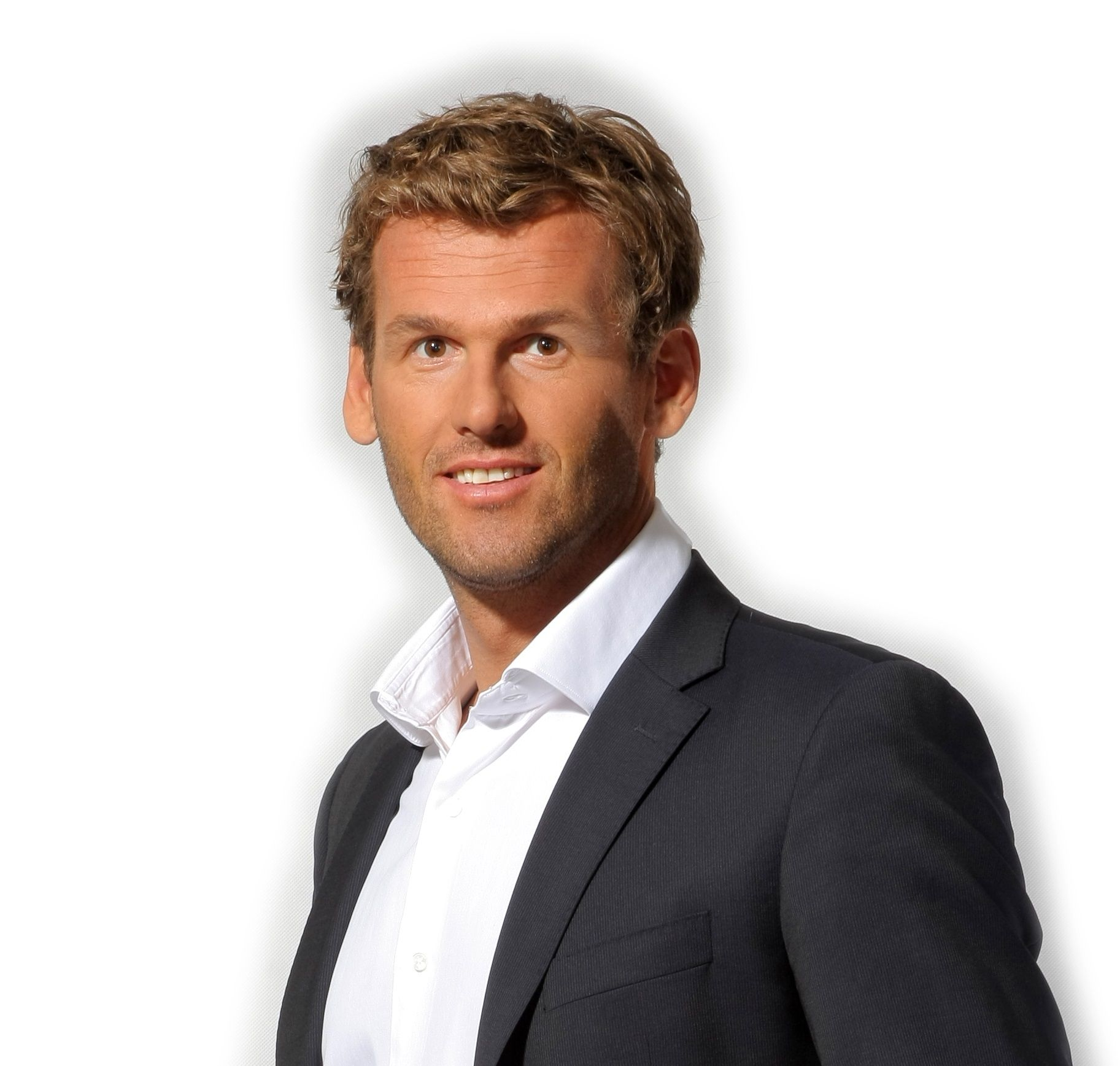 Mateusz Kusznierewicz.